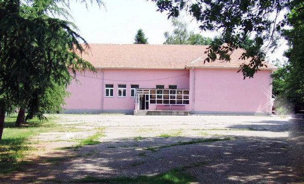 Škola u Baroševcu